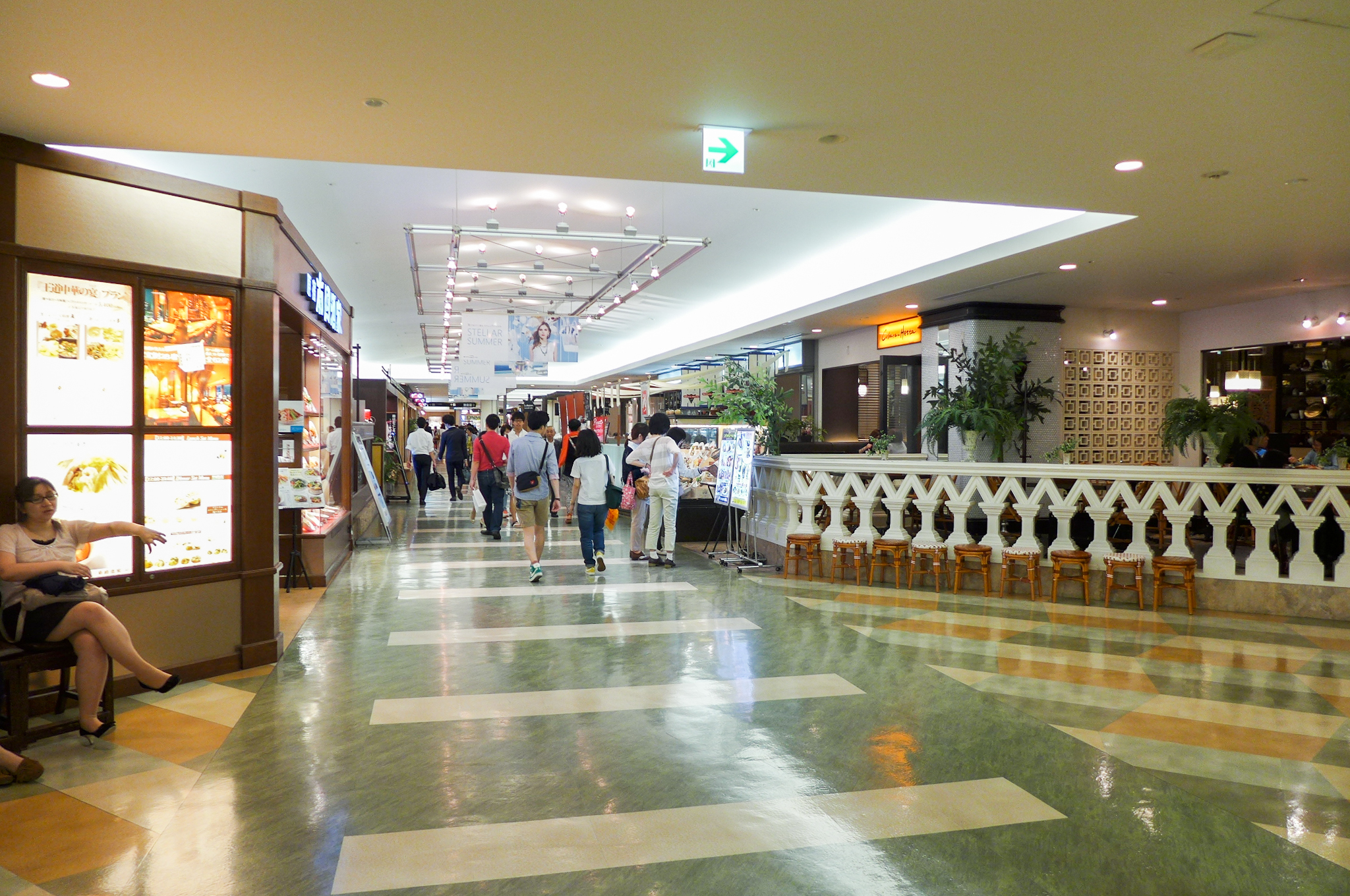 Stellar Place Sapporo Level 6